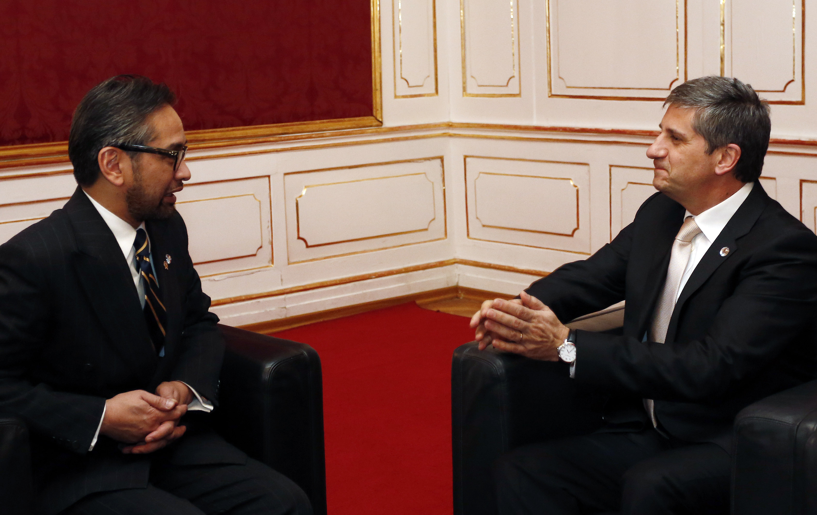 5. Global Forum der Allianz der Zivilisationen der Vereinten Nationen in Wien, Außenminister Michael Spindelegger trifft den indonesischen Außenminister Marty Natelgawa. Wien, 27.02.2013, Foto: Dragan TATIC